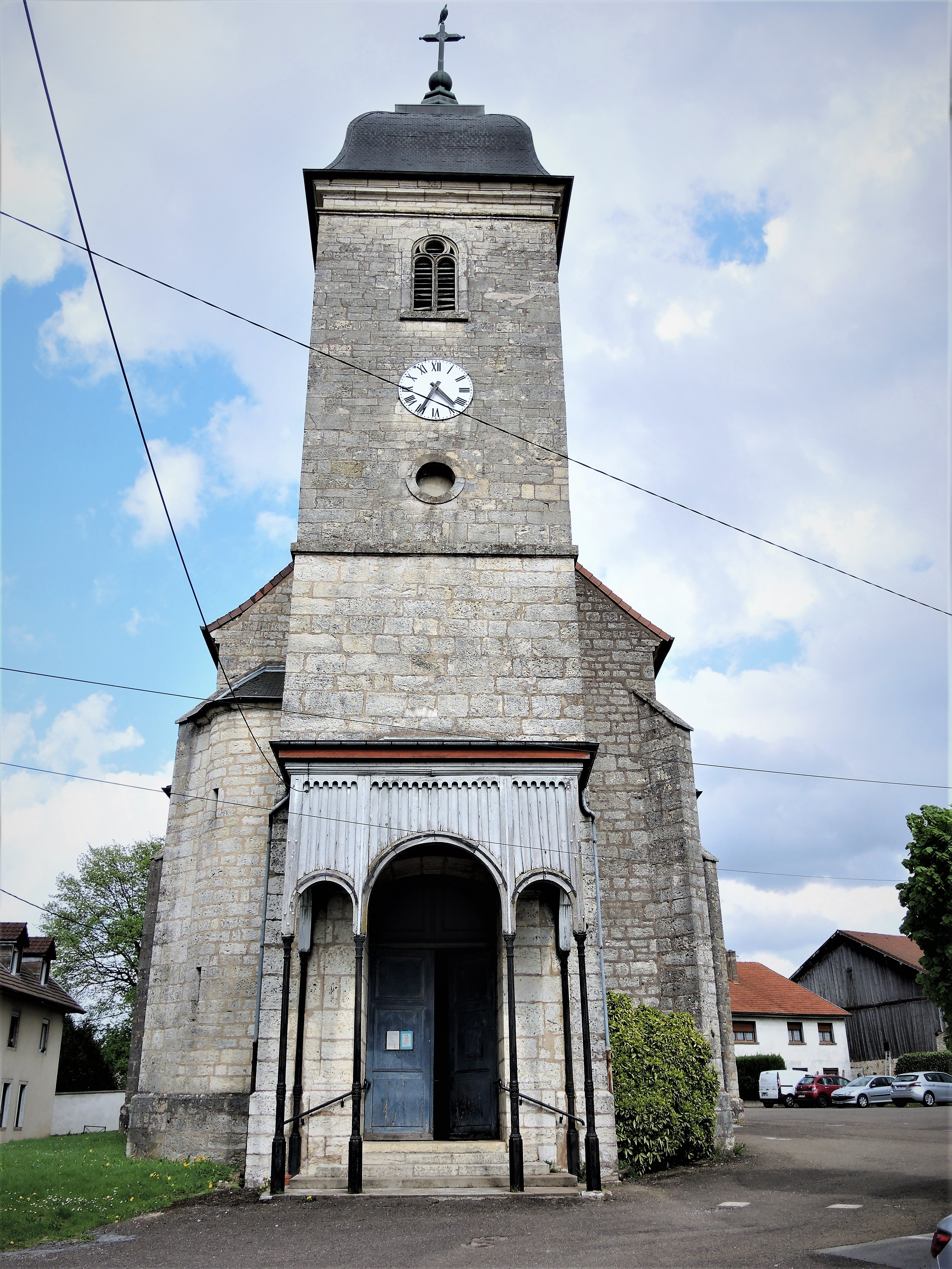 Porche et clocher de l'église Saint-Valère de Nancray. Doubs